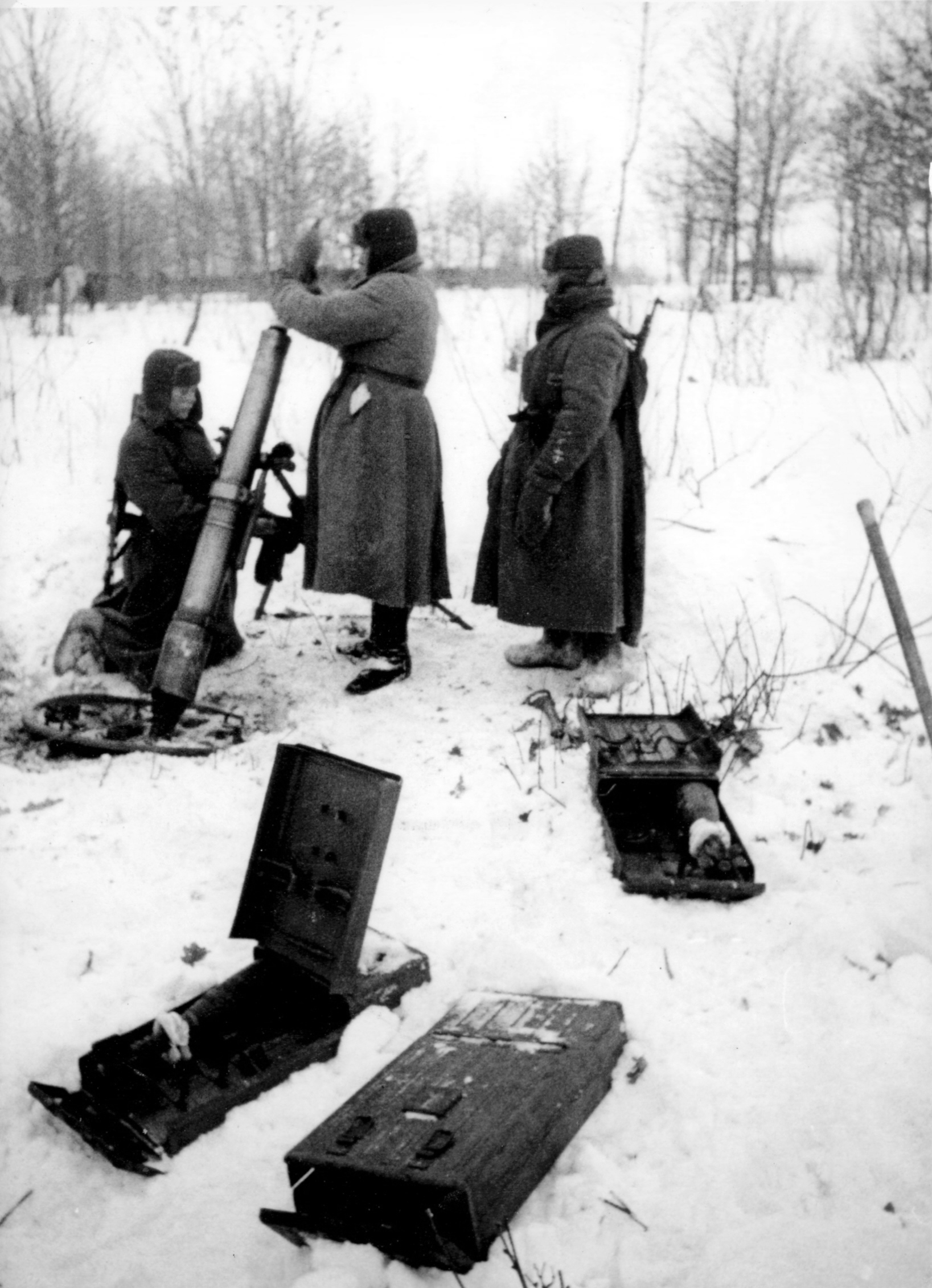 Расчет советского 107-мм полкового горно-вьючного миномёта образца 1938 года на позиции во время битвы за Москву. Московская область, зима 1941 — 1942 гг. Источник: Государственный Зеленоградский историко-краеведческий музей.